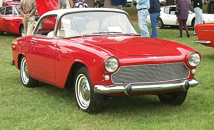 1960-62 Simca Aronde Plein Ciel